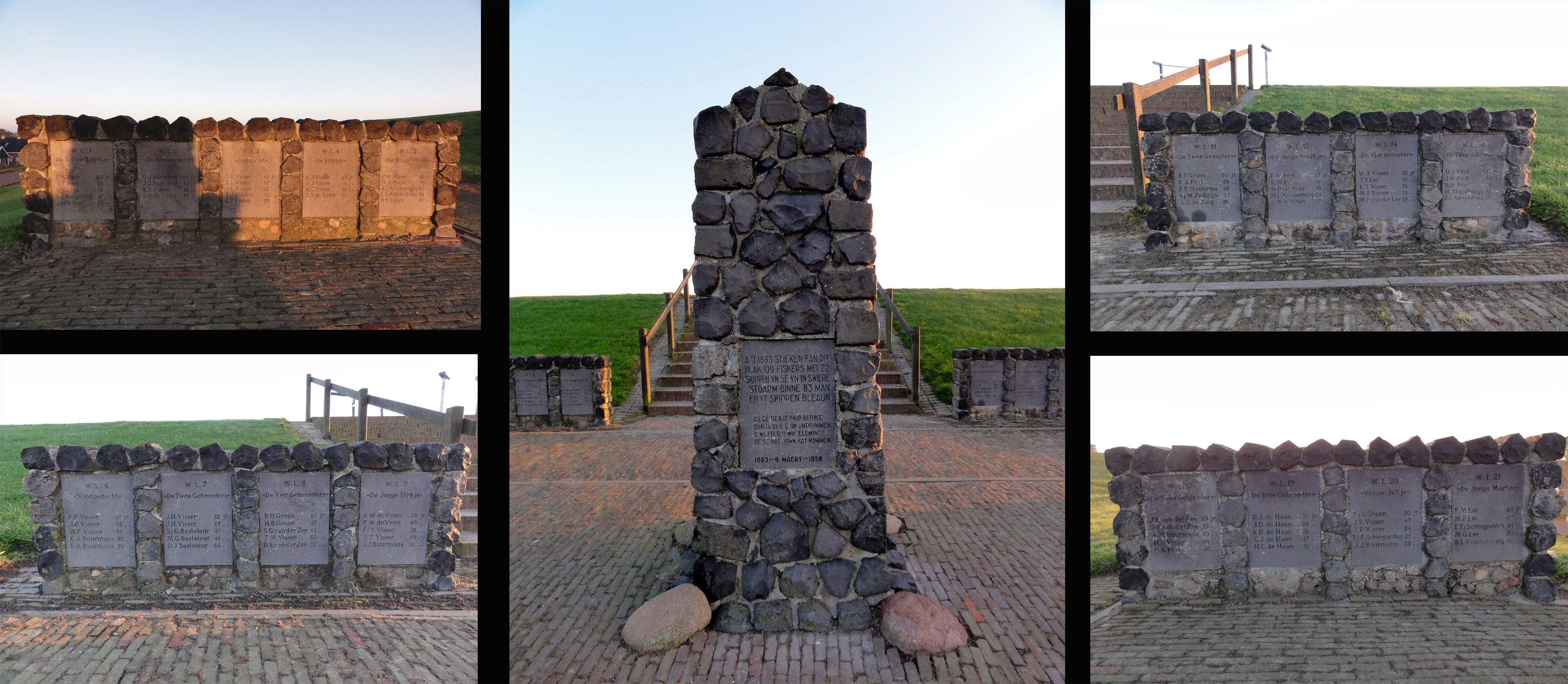 Vissersmonument van Moddergat, als herinnering aan de stormramp van 1883, waarbij 83 vissers verdronken